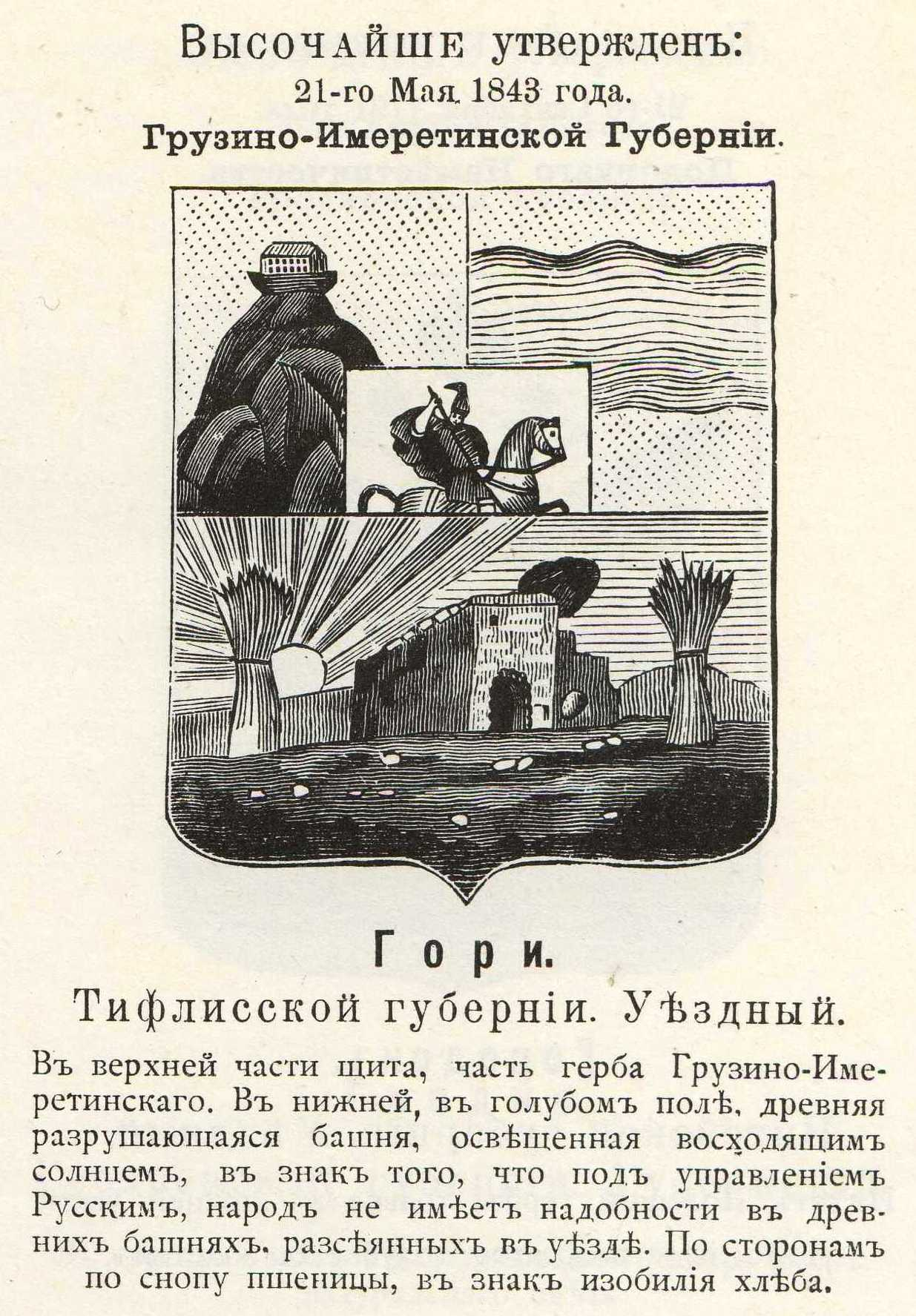 Official Russian Empire coat of arms: Gori. Герб уездного города Российской Империи Гори Тифлисской губернии в 1899, Грузино-Имеретинской губернии в 1843 с официальным описанием в Гербовнике Винклера.